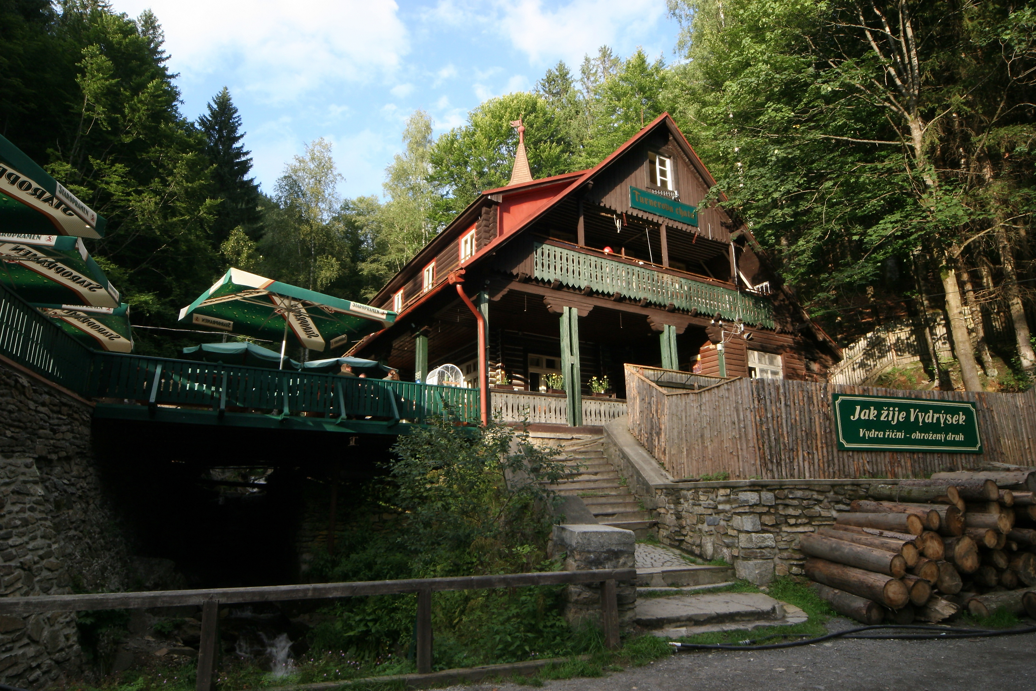 Fotografie Turnerovy chaty